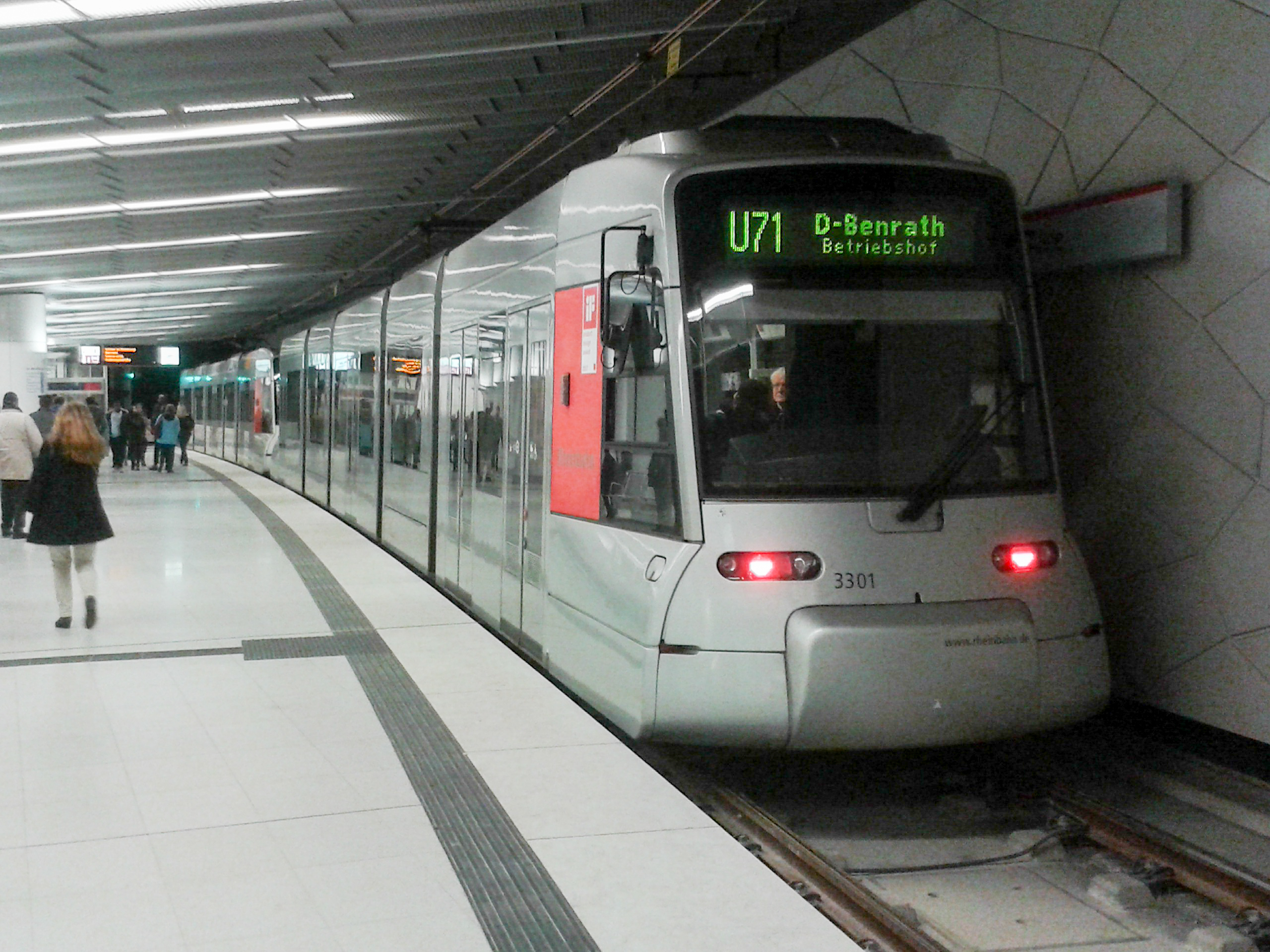 Ein NF8U-Doppel im U-Bahnhof Heinrich-Heine-Allee